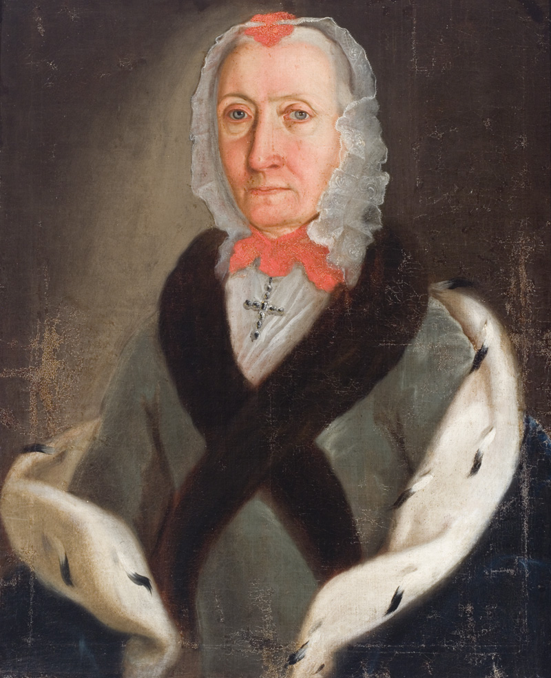 Беларуская (тарашкевіца): Партрэт Альжбеты Пузыны (Alžbieta Puszyna) з князёў Агінскіх (Aginski).